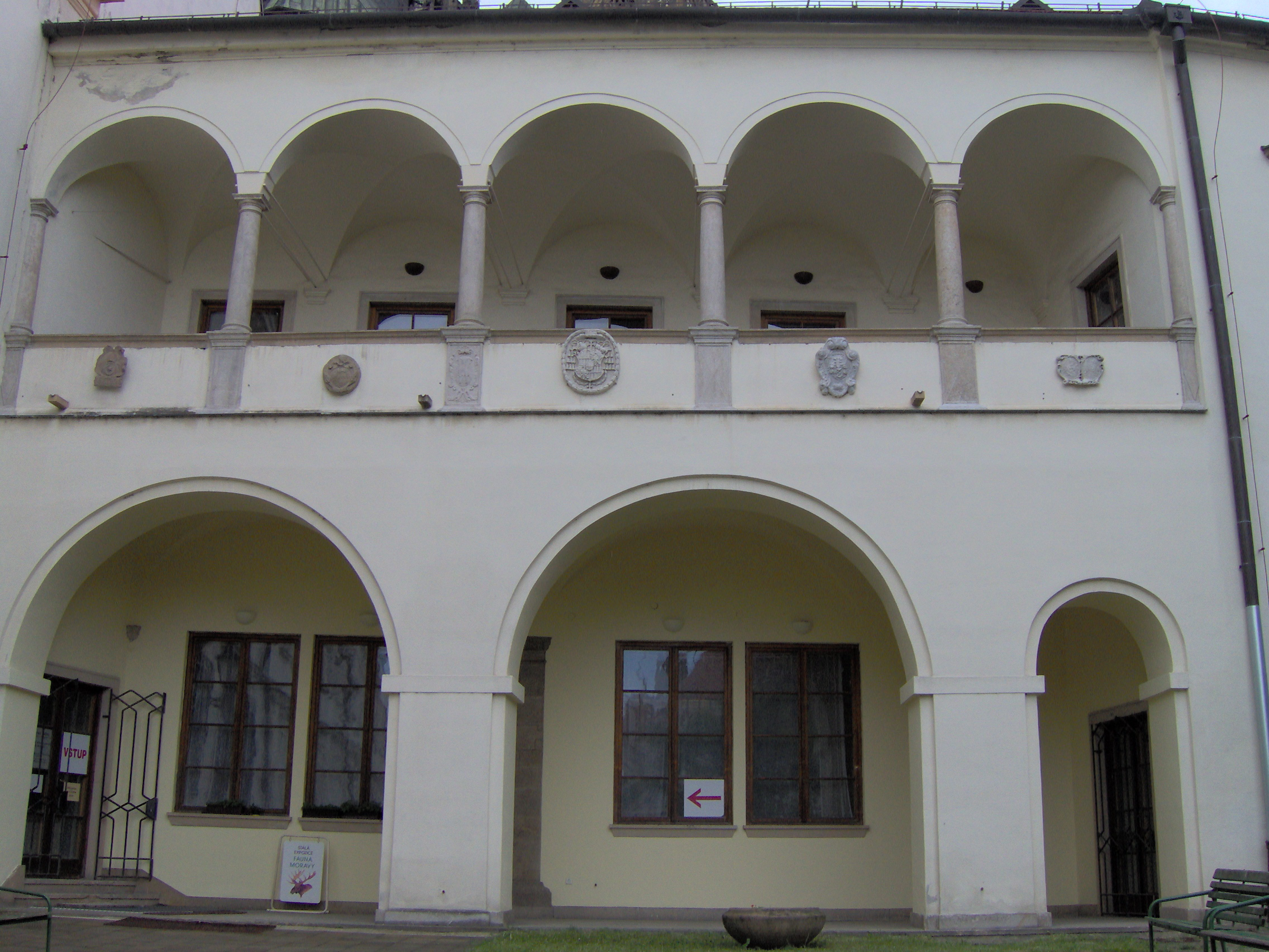 Arkádové lodžie Biskupského dvora v Brně